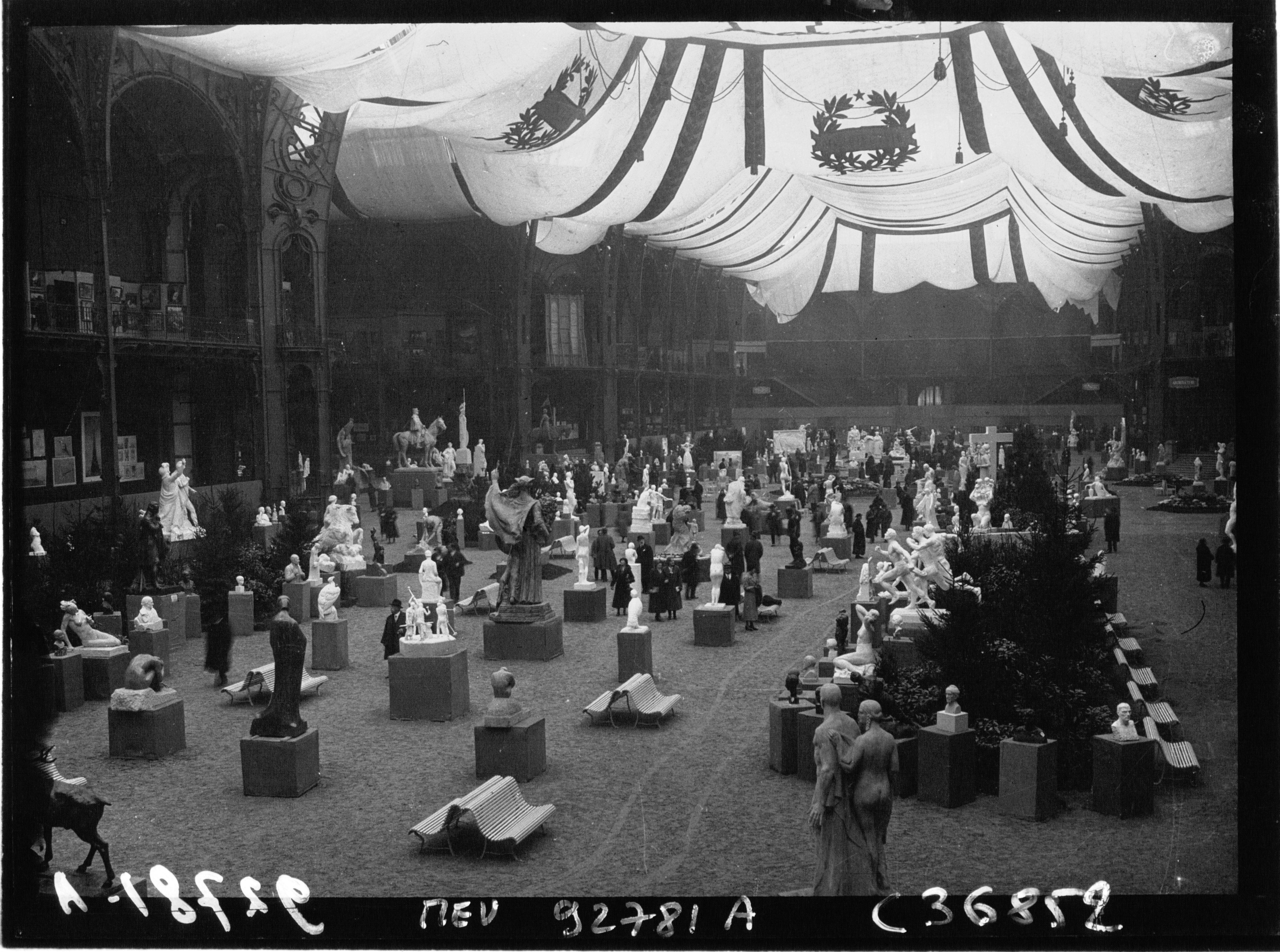 Salon des artistes français, Grand Palais, Paris, France.